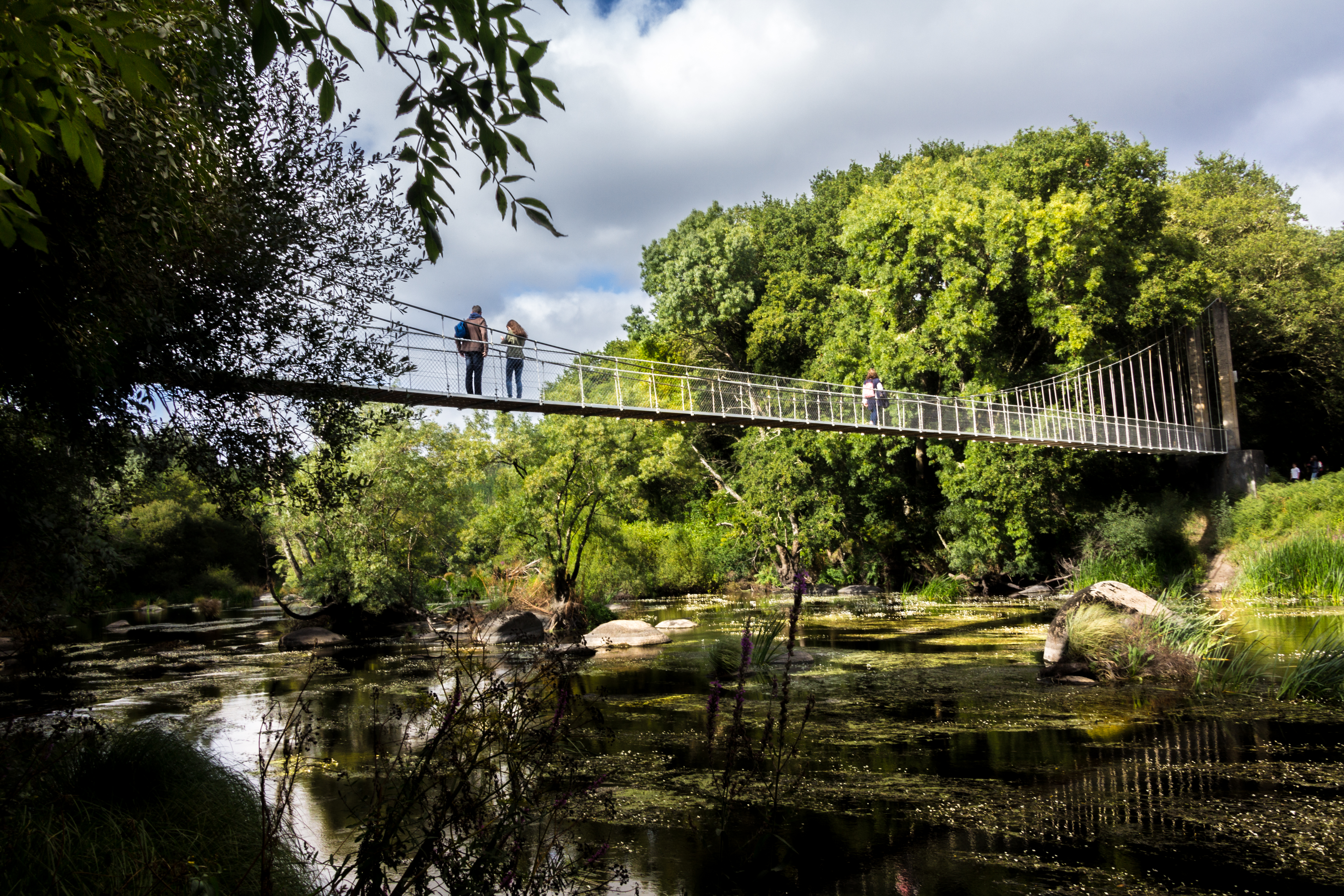 Puente Colgante en la Ínsua de Seivane.